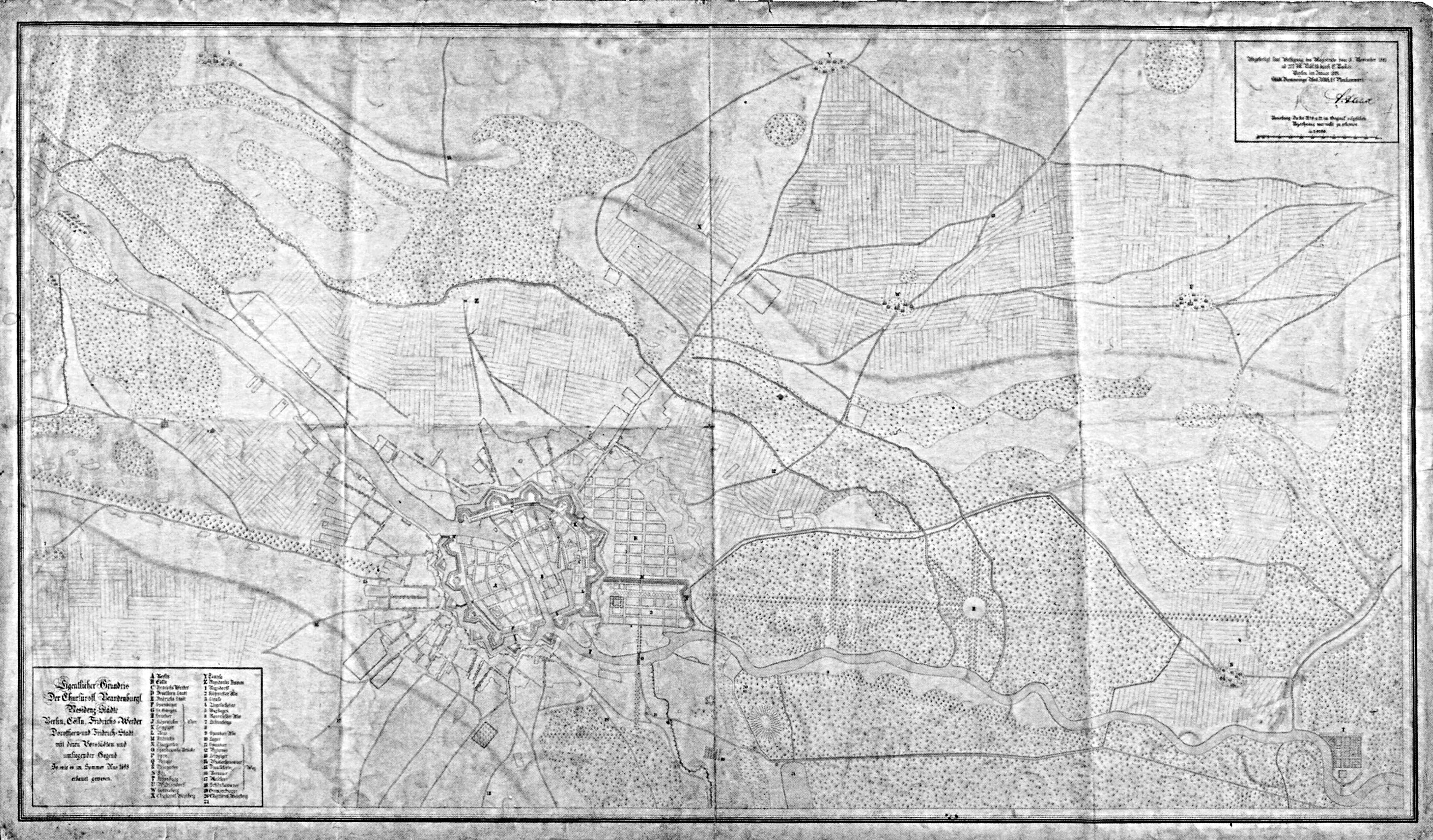 Der Titel steht links unten zusammen mit einer Legende (A-Z und 1-21). Hier abgebildet ist eine Kopie von 1893 der anynomen Handzeichnung - die Kopie enthält rechts oben den Hinweis: "Angefertigt laut Verfügung des Magistrats vom 3. November 1893 ad 227 M.Bibl. 93 Durch E. Becker. Berlin im Januar 1894. Städt. Vermessungs Amt Abth. I (Plankammer) [Stempel und Signatur] Bemerkung: Die bei 8 u. 21 im Original aufgeführte Bezeichnung war nicht zu erkennen. ca 1:9100" - darunter ein Maßstab über 1000m